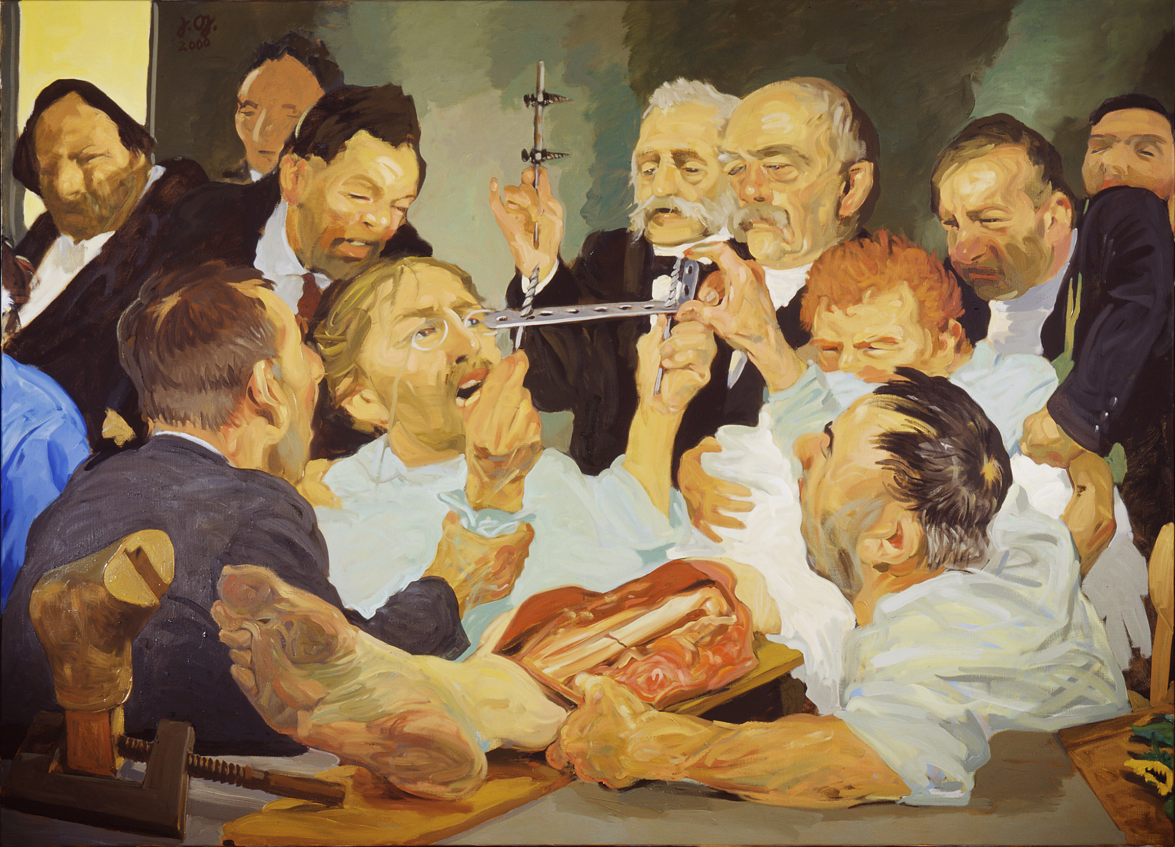 Ausschnitt aus dem Wandbild im Hörsaal des Berufsgenossenschaftlichen Unfallkrankenhauses Hamburg: „Aus der Geschichte der Unfallchirurgie“. Carl Hansmann hält eine Lochschiene für die Osteosynthese in die Höhe. Bernhard von Langenbeck zeigt eine von außen anzuschraubende Schiene. Reichskanzler Otto v. Bismarck ist als Vater der Sozialversicherung zugegen.